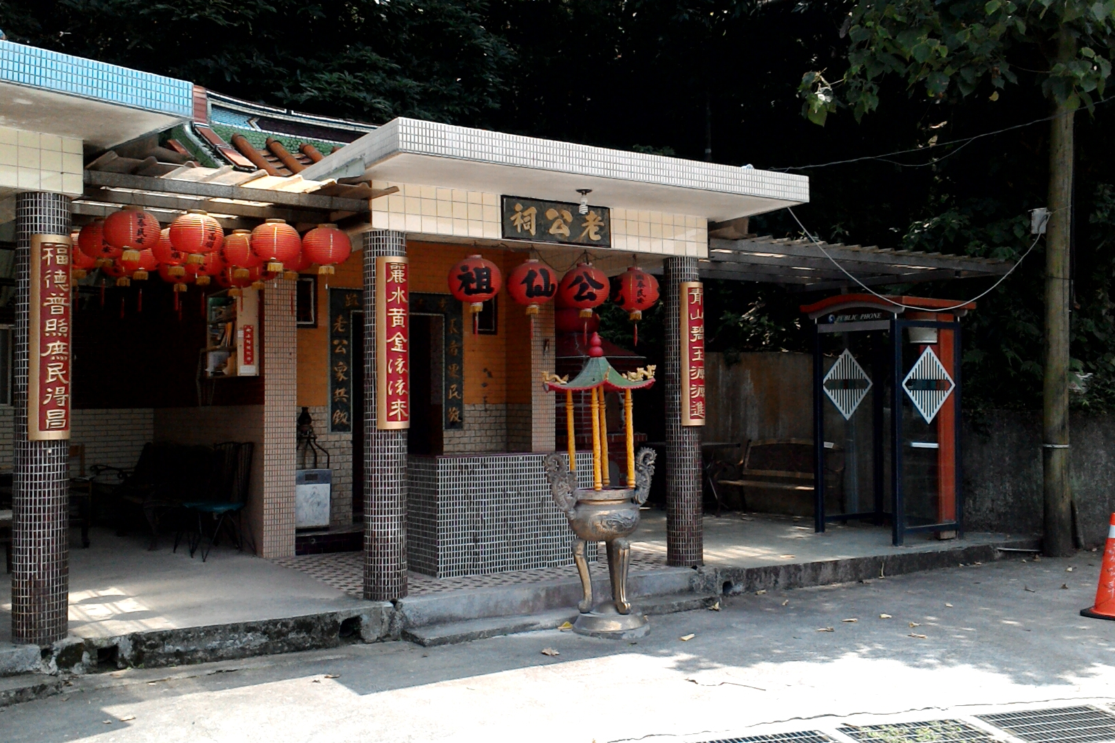 老公祠與一旁的電話亭,台北市內湖區金龍次分區秀湖里